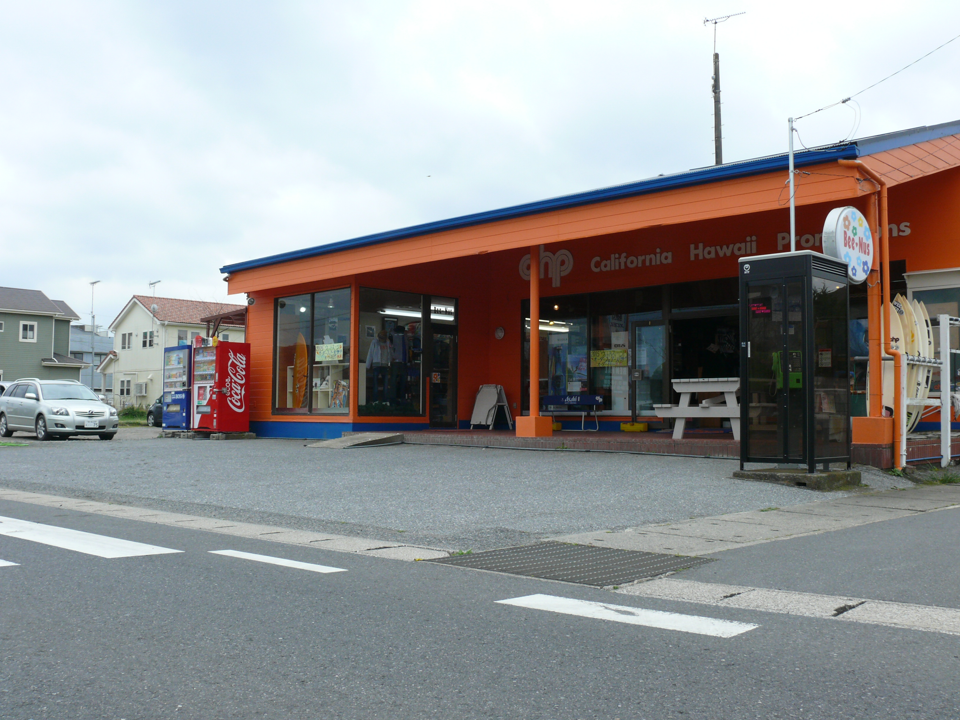 CHP:カルホルニアハワイプロモーション（本店）